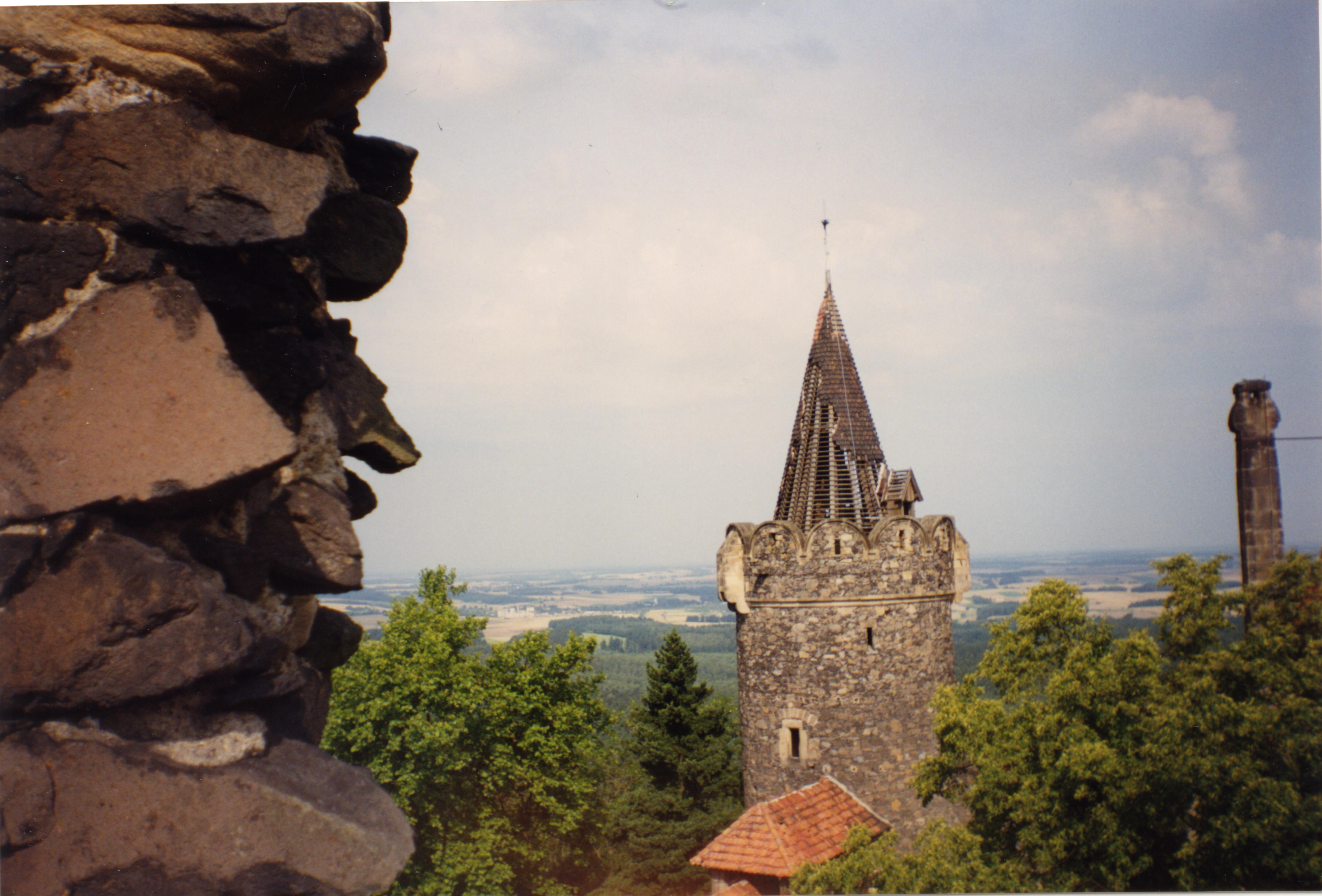 zrekonstruowany, późnogotycki zamek "Grodziec" w Grodźcu, powiat złotoryjski. Widok z na wieżę zachodnią, obecnie już wyremontowaną.